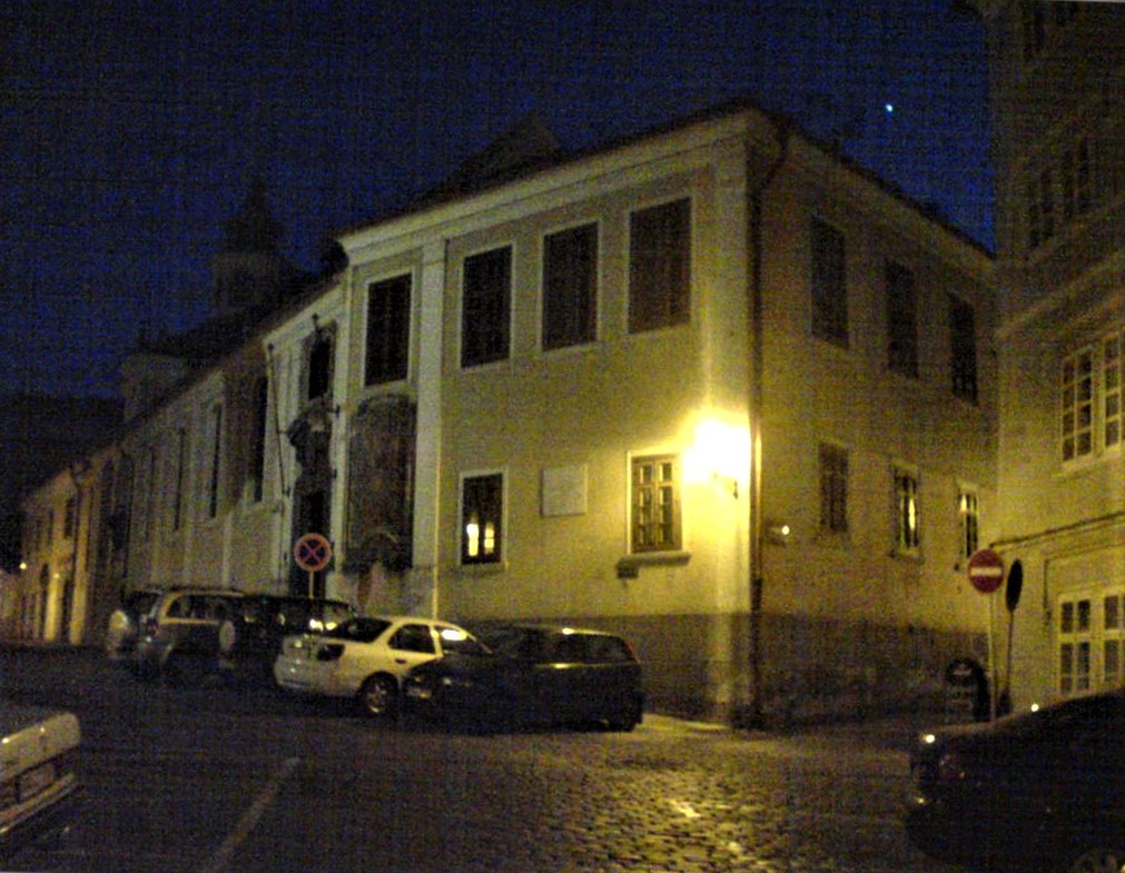 foto objektu z 90. let 20. století